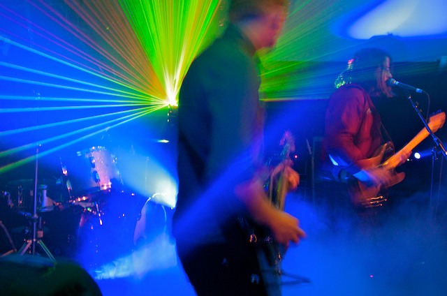 Reykjavik, Iceland - April 2009